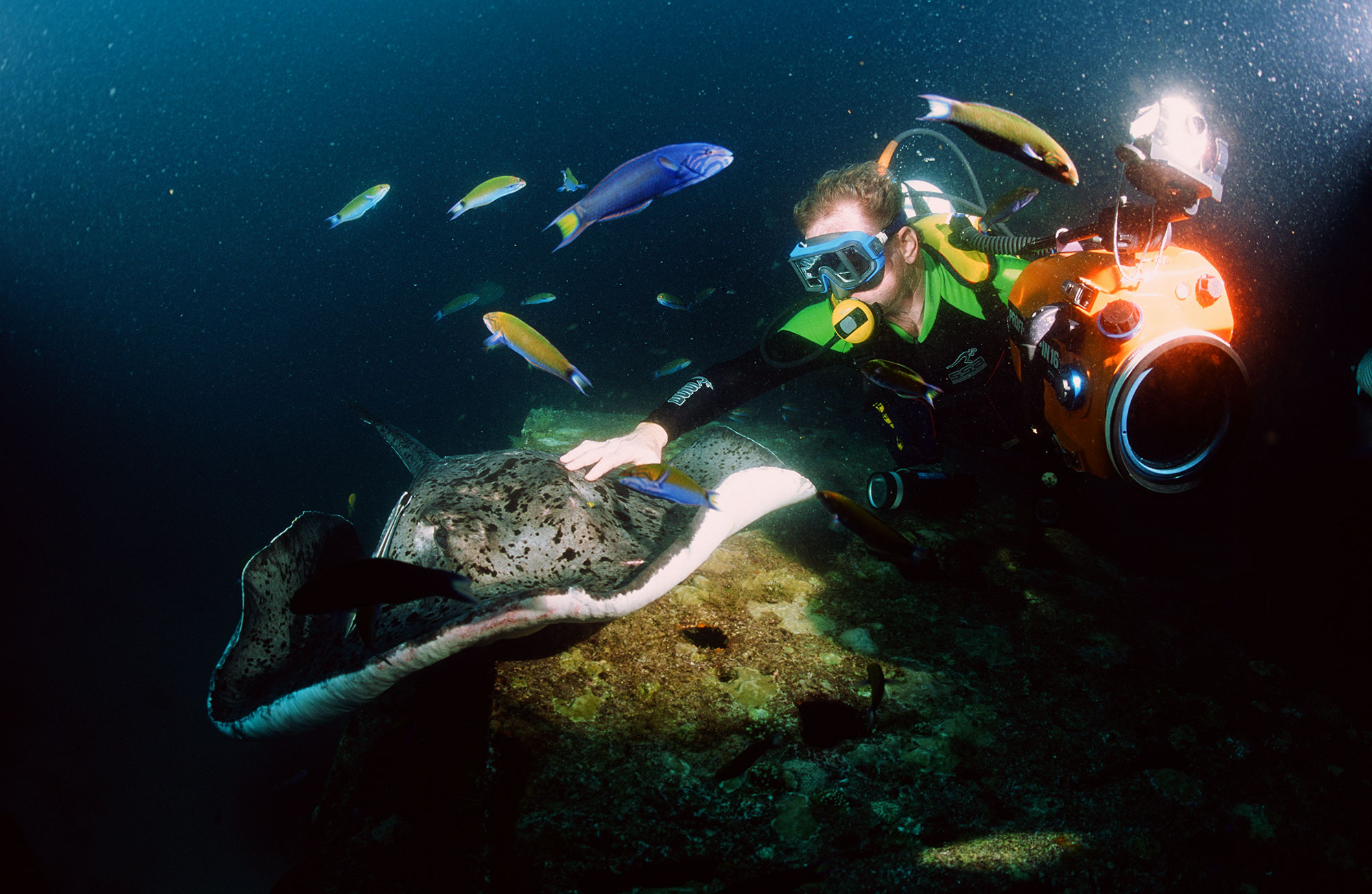 Dreharbeiten im südchinesischen Meer